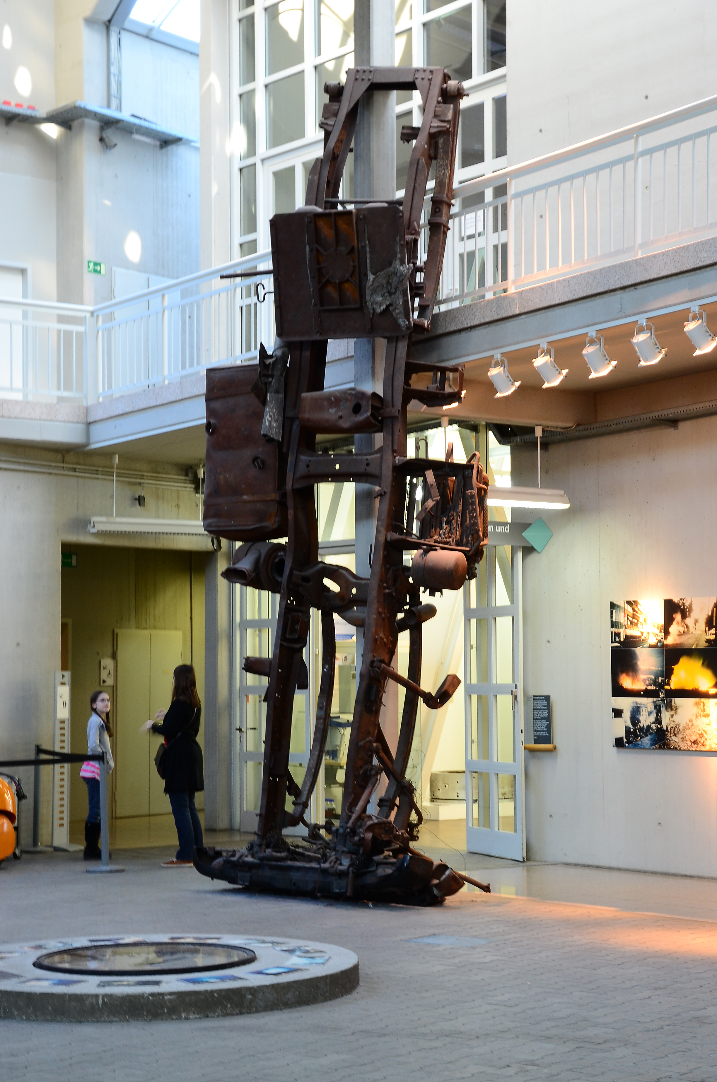 Dortmund, DASA, Reste des LKW-Fahrgestells des in Herborn verunfallten Tankzuges